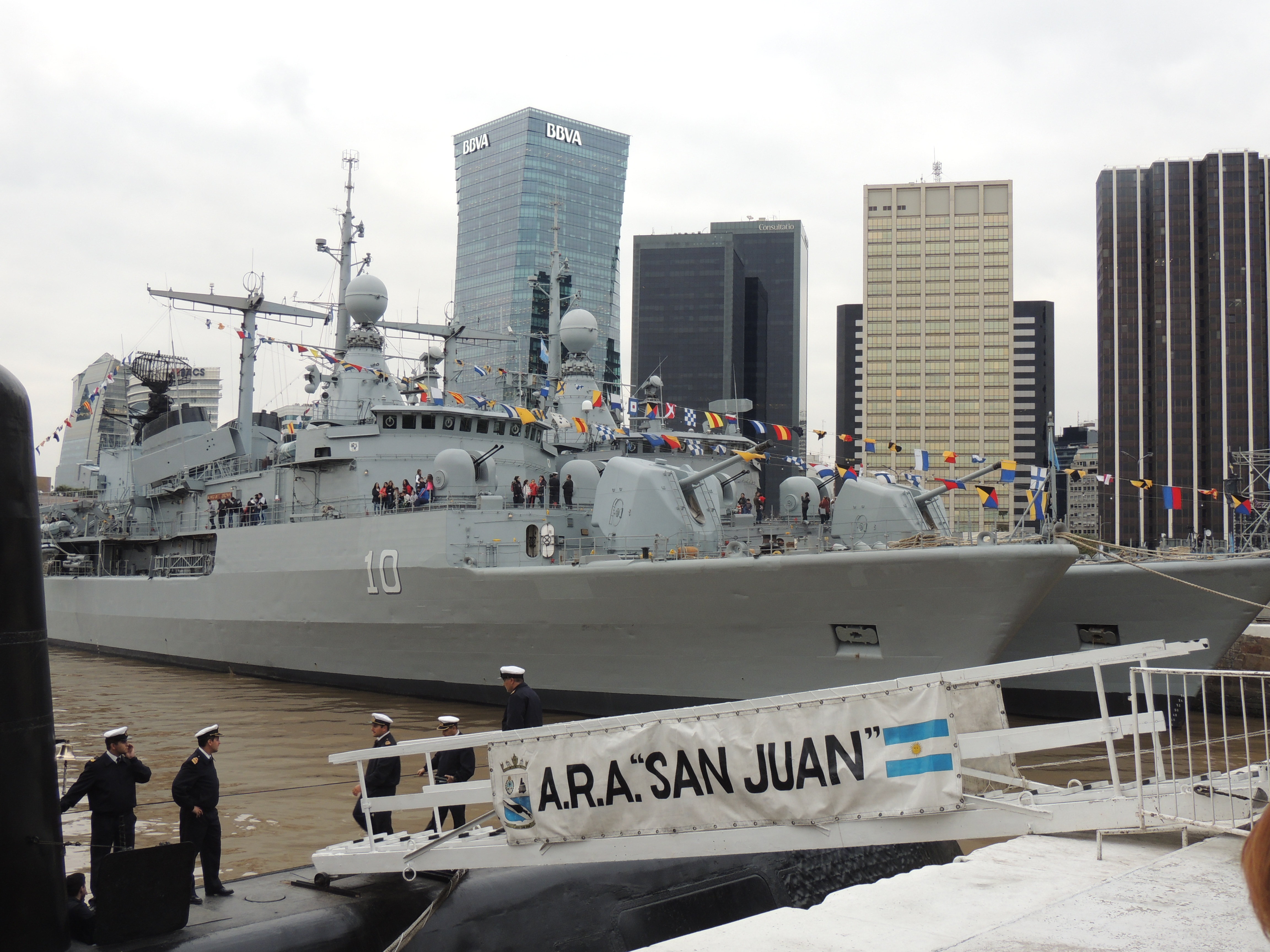 Destructores ARA “Sarandí” y ARA “Almirante Brown” en el Apostadero Naval de Buenos Aires, durante una jornada de puertas abiertas en mayo de 2017 por el día de la Armada Argentina.